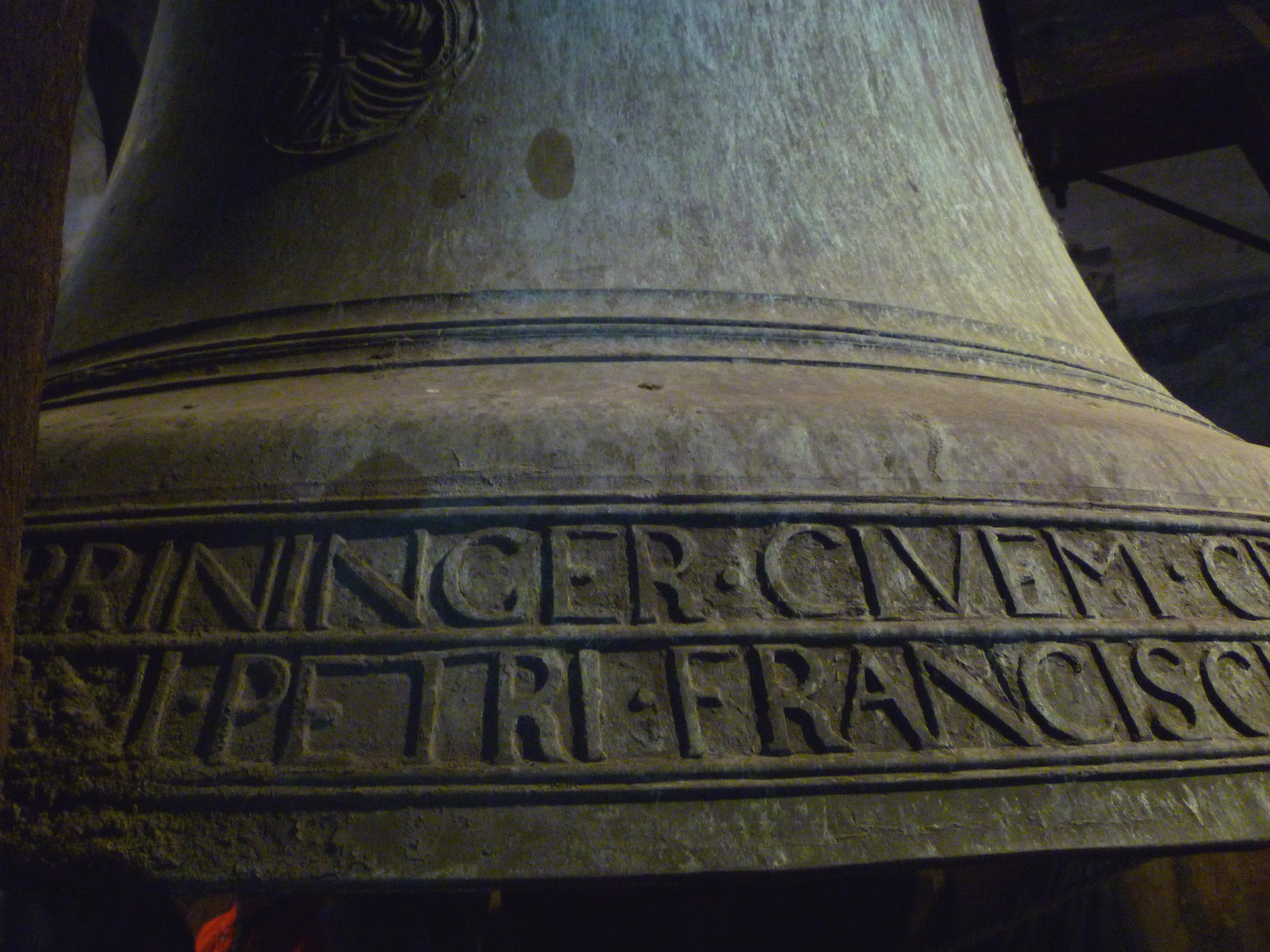 Namenszug des Glockengießers Mathias Prininger auf der Glocke der Piaristenkirche Krems